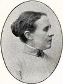 Helfrid Norell (1851-1936)